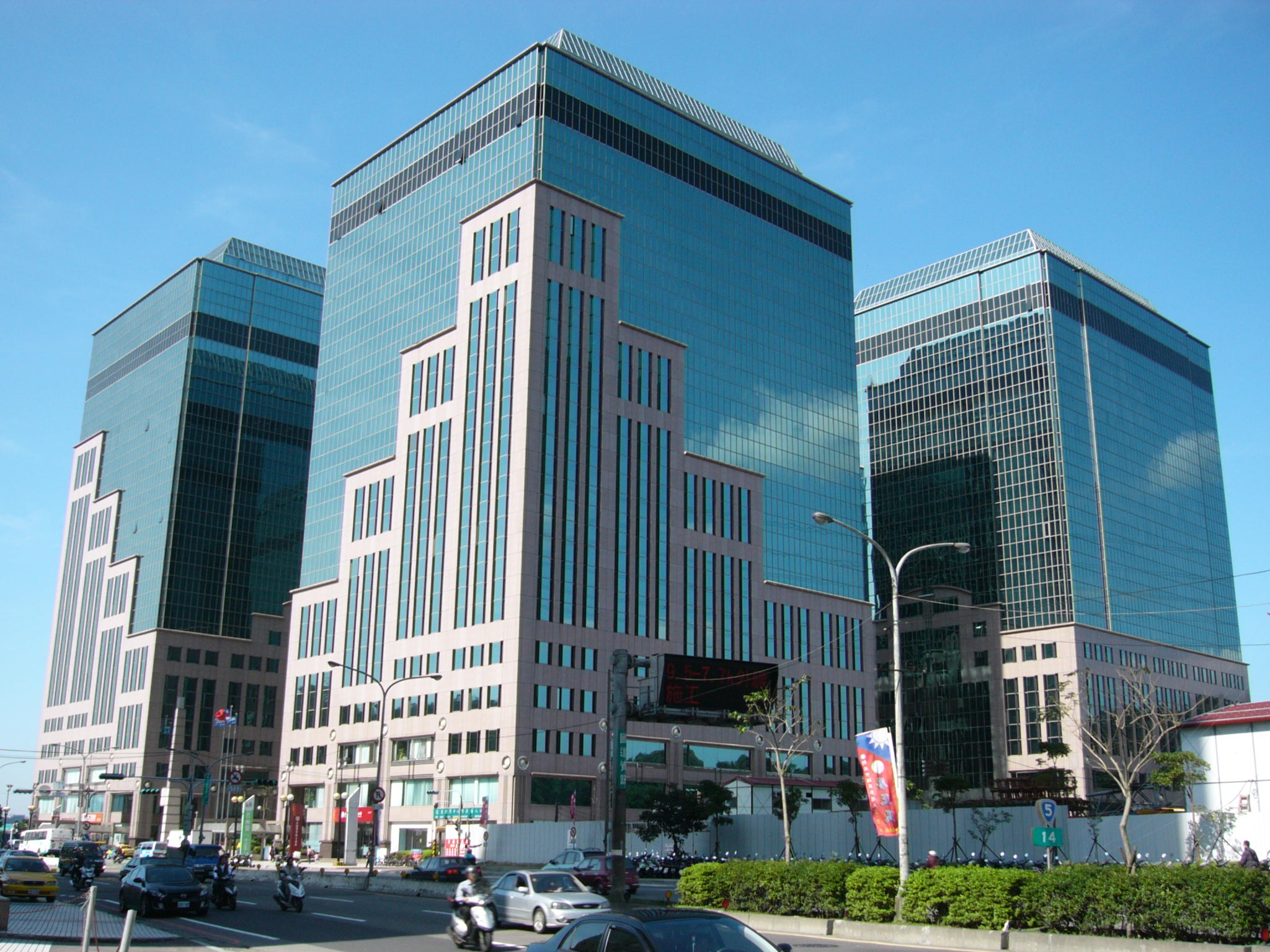 遠東世界中心右前方外觀。